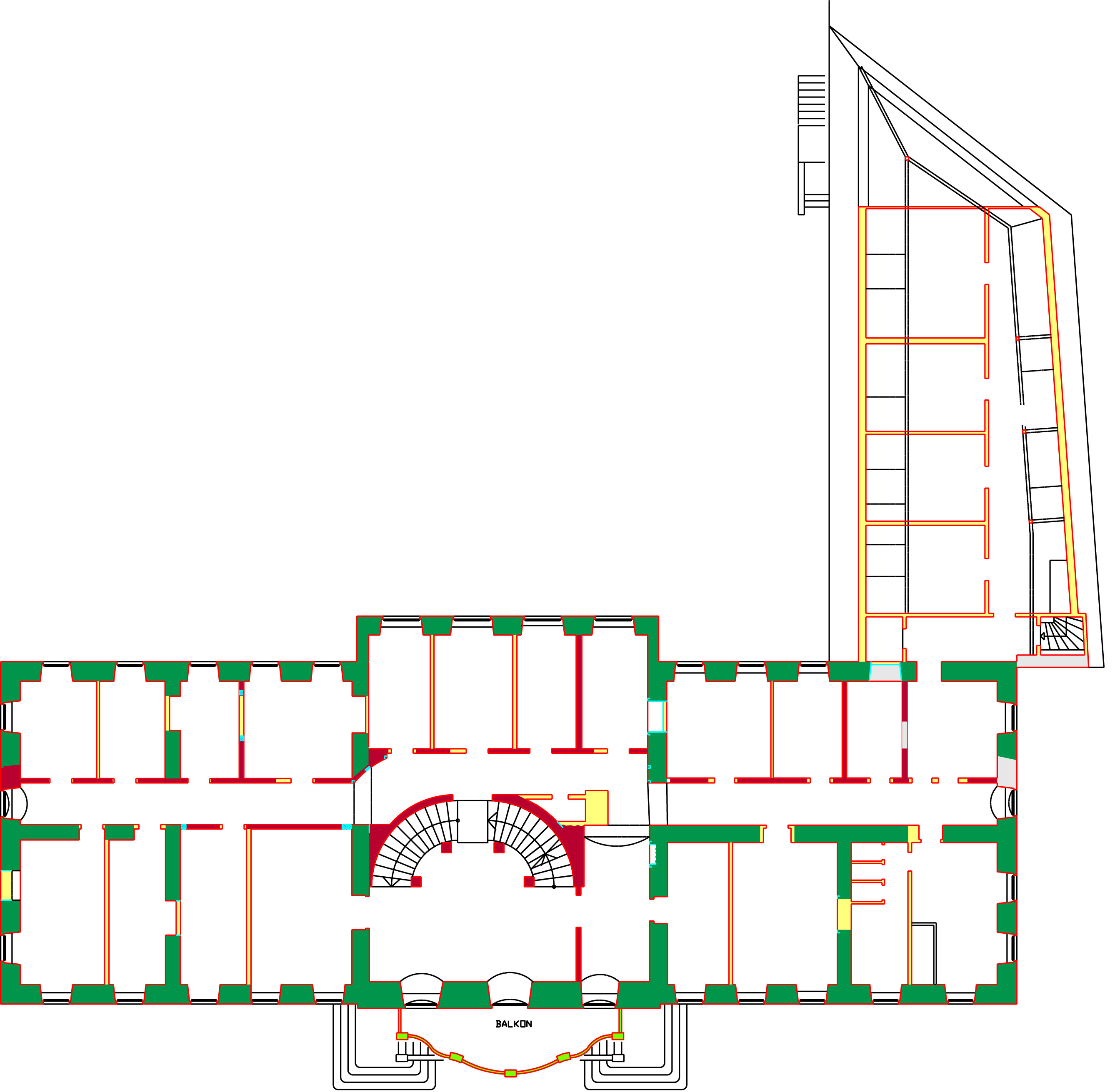 Obergeschoß Grundriss mit historischen Bauepochen, Schloß Mutzschen, Landkreis Leipzig